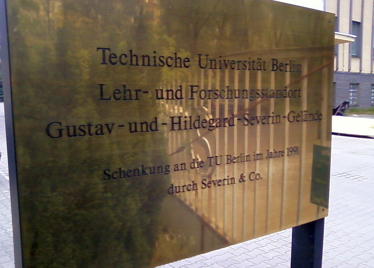 Das Schild steht am Tor zum Severin-Gelände der TU Berlin.